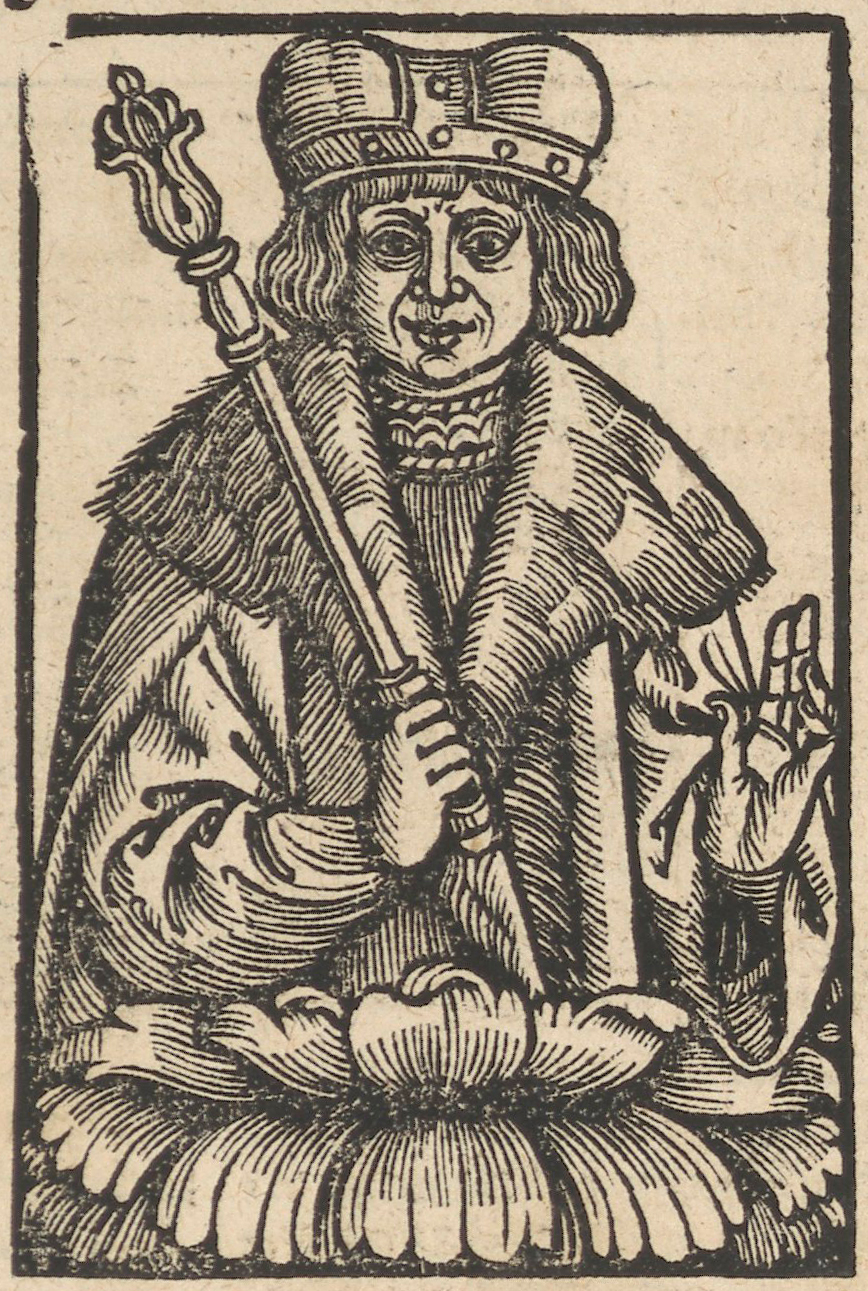 Беларуская (тарашкевіца): Уяўны партрэт Нарымонта (Narymont)